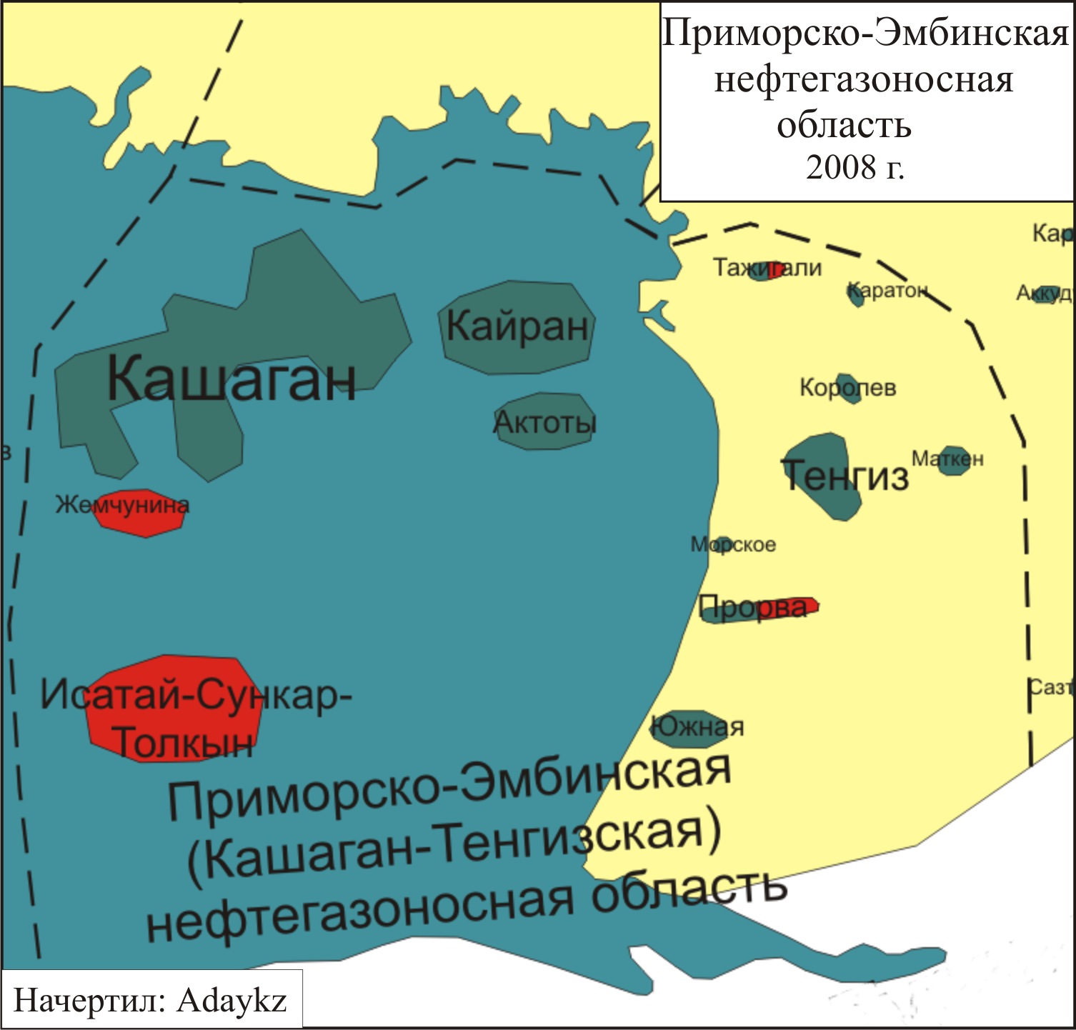 Карта размещение нефтяных и газовых месторождении Приморско-Эмбинская НГО